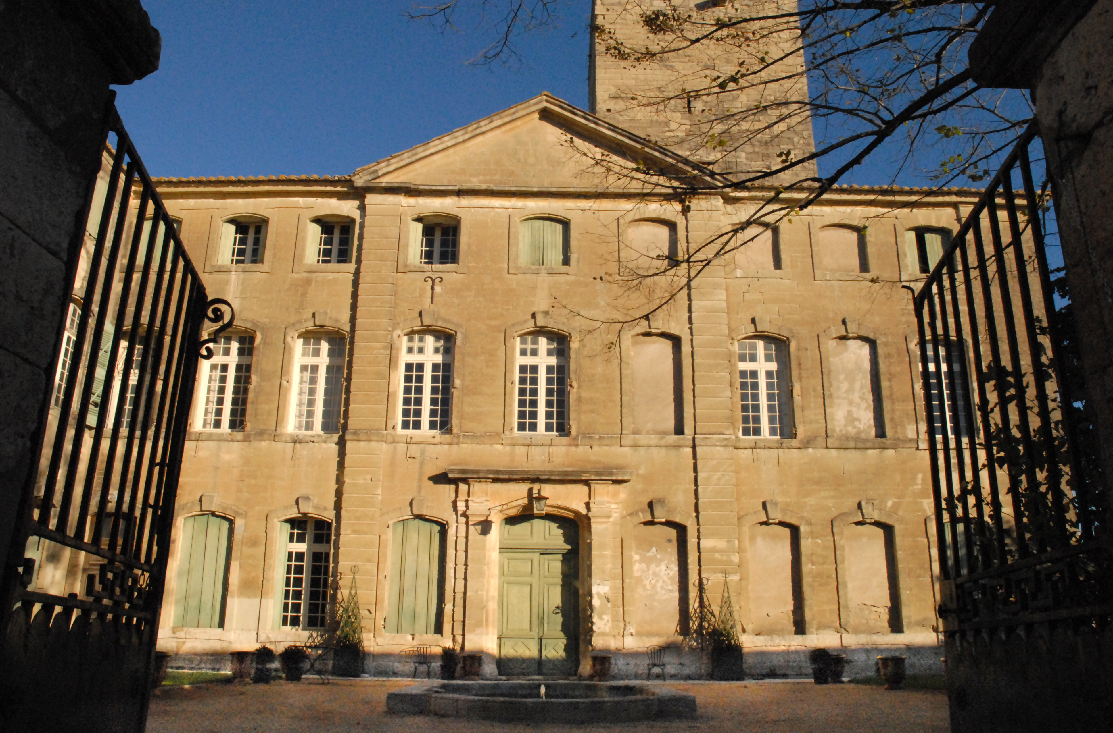 Façade du château de Sanilhac dans le Gard